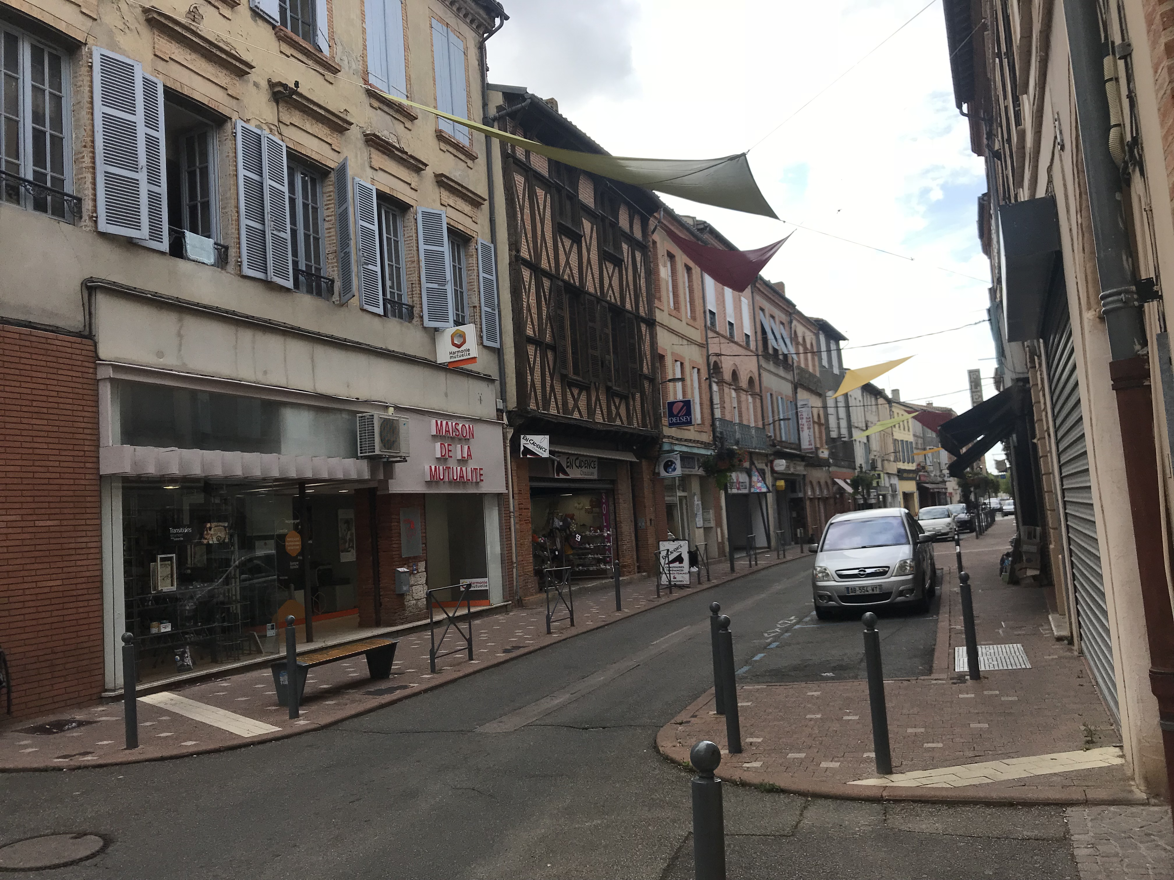 Castelsarrasin